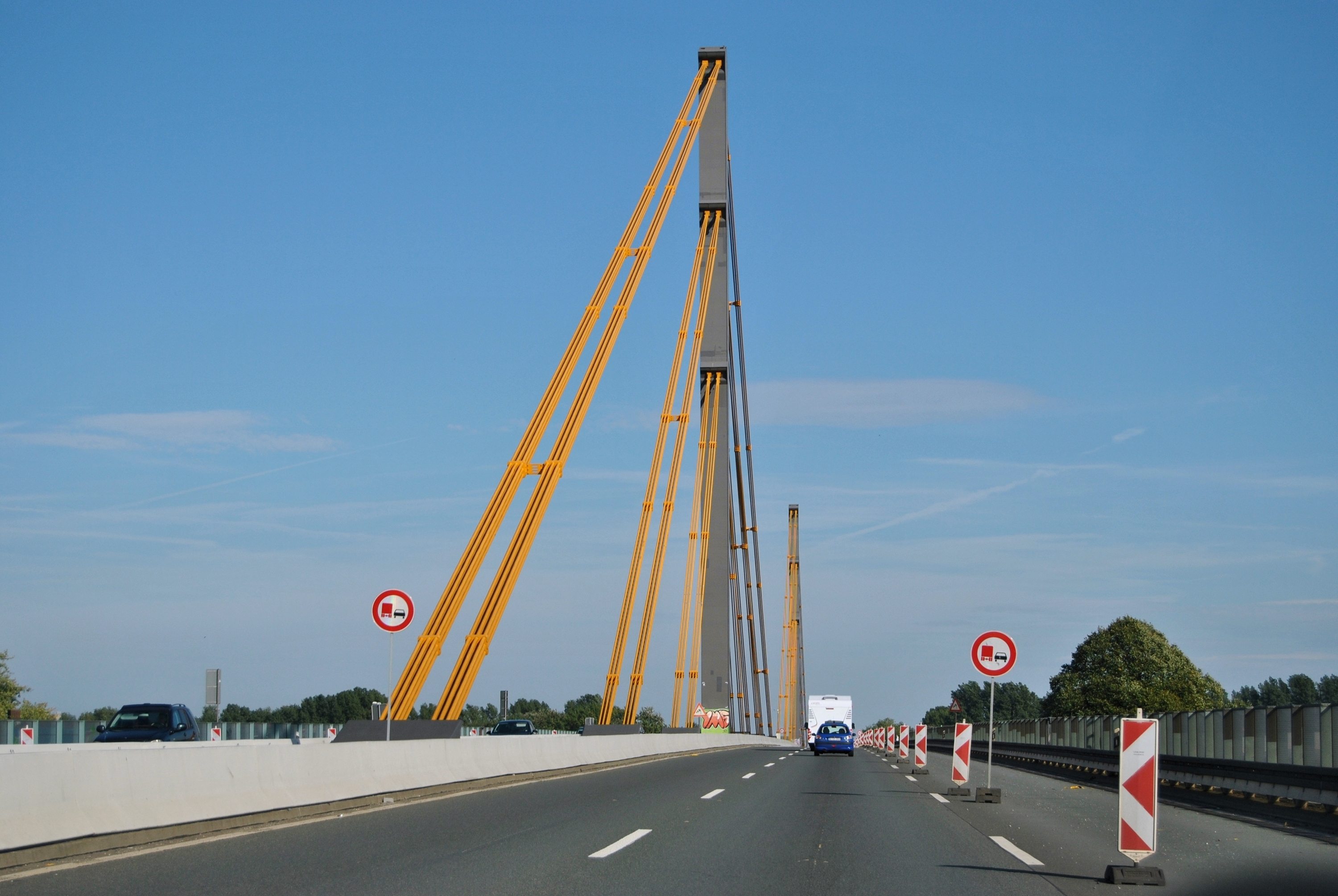 Die Autobahn A 40 auf der Rheinbrücke Neuenkamp über den Rhein in Duisburg